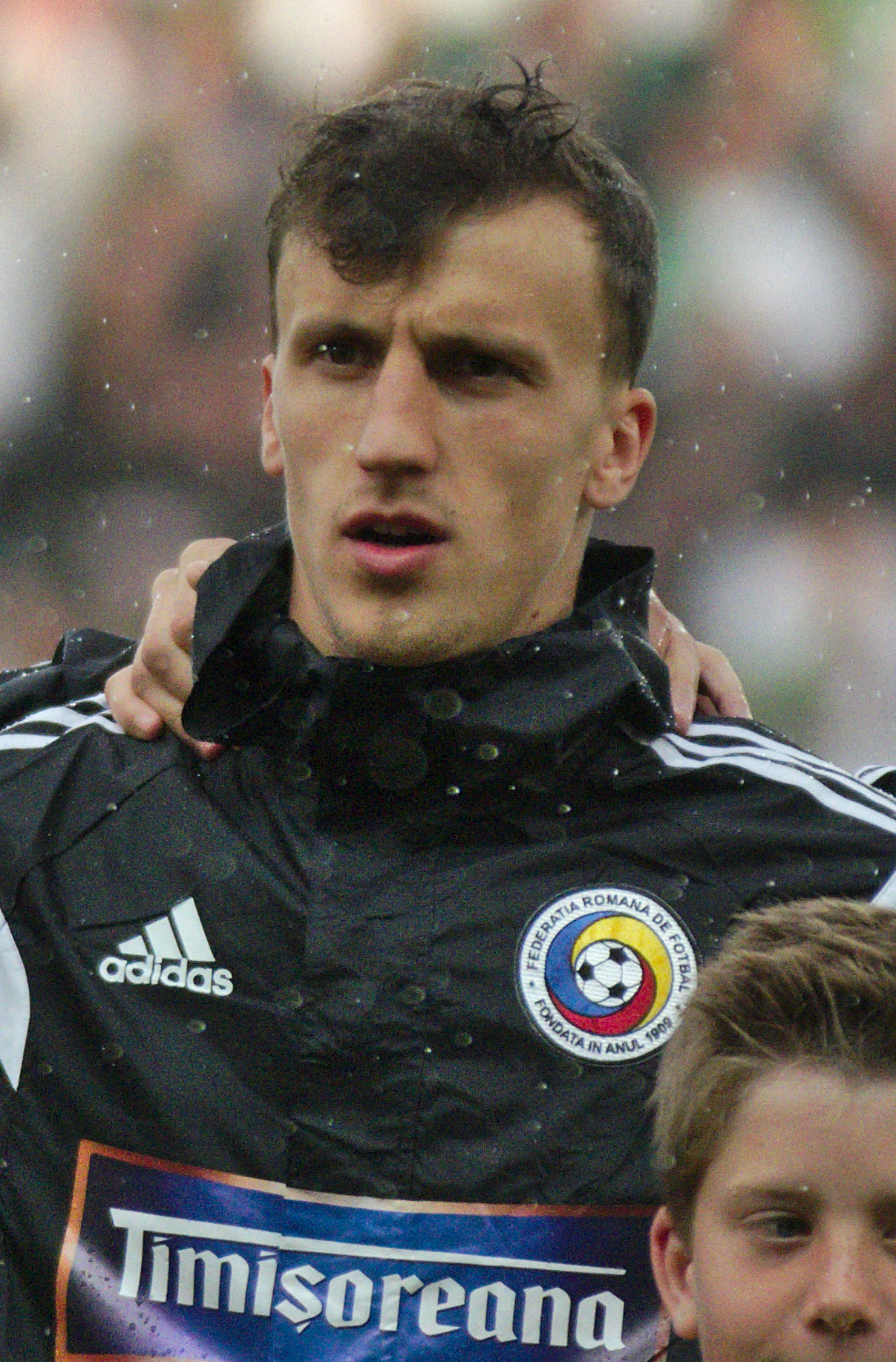 Algérie-Roumanie - 20140604 - Vlad Chiricheș